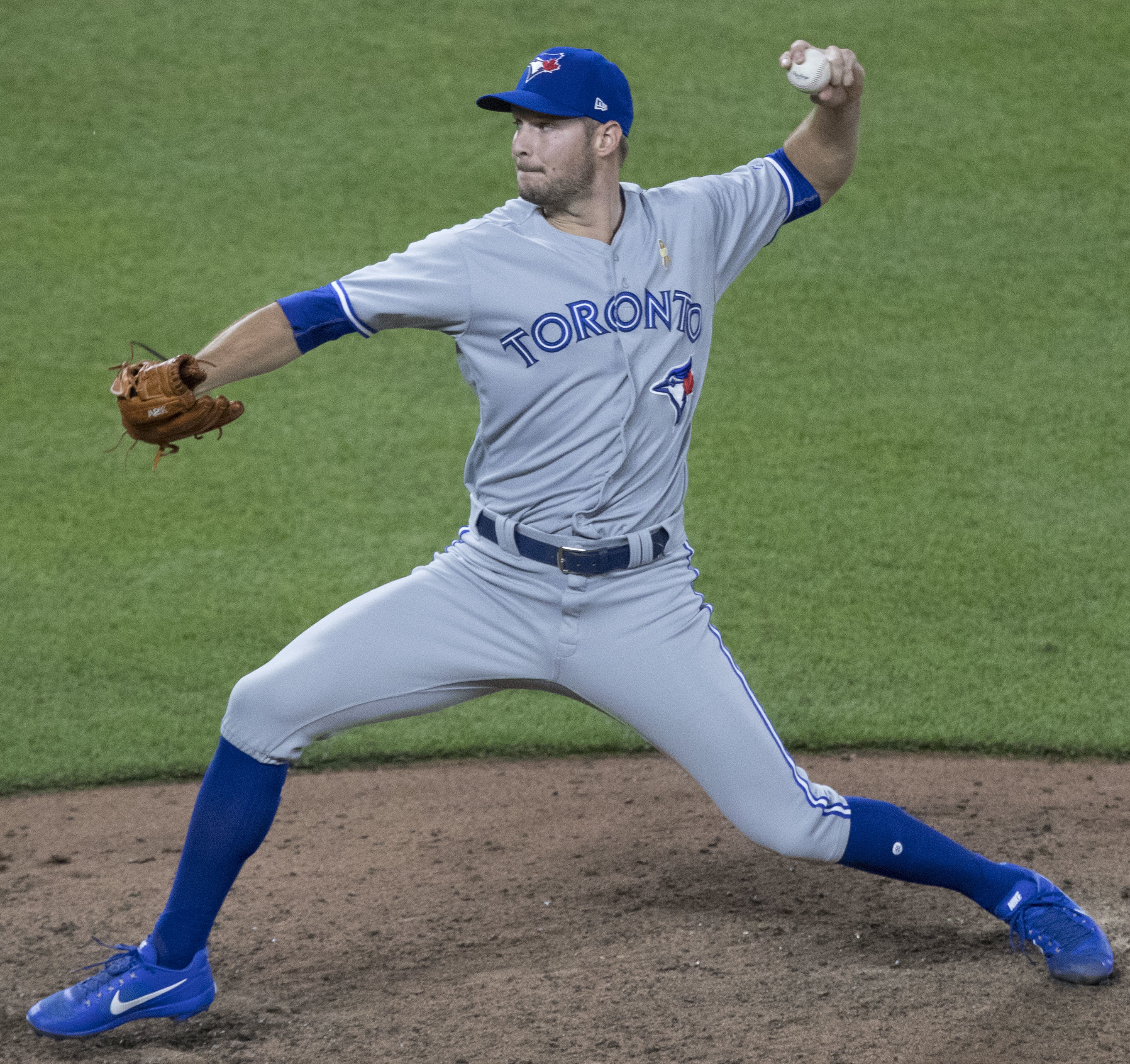 Blue Jays at Orioles 9/1/17